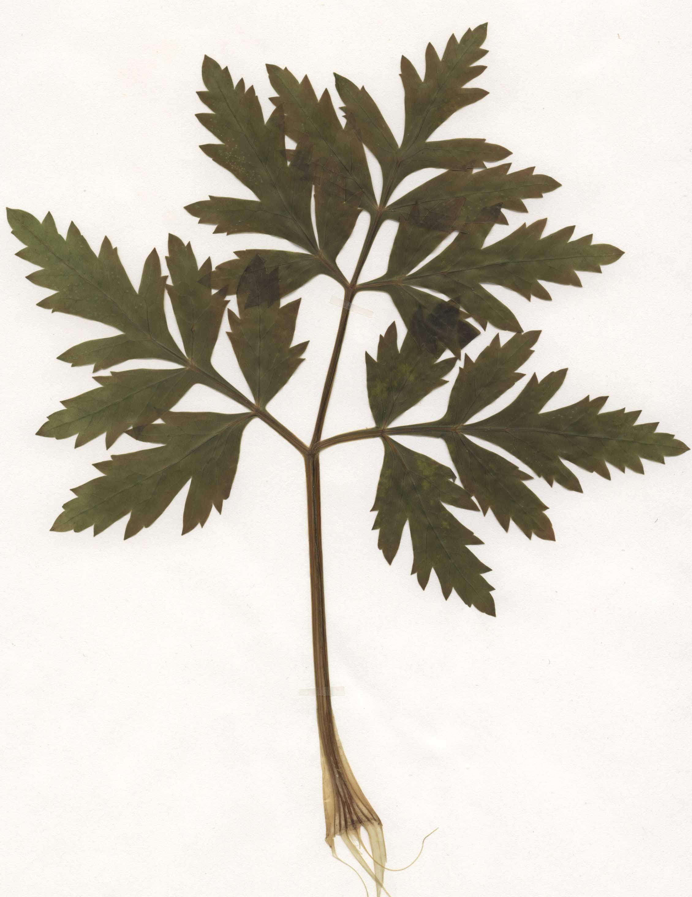 Pleurospermum austriacum, Stängelblatt, eigener Herbarbeleg von 1988, Unterfranken